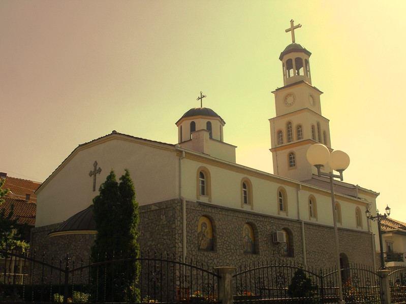 Соборен храм Виница